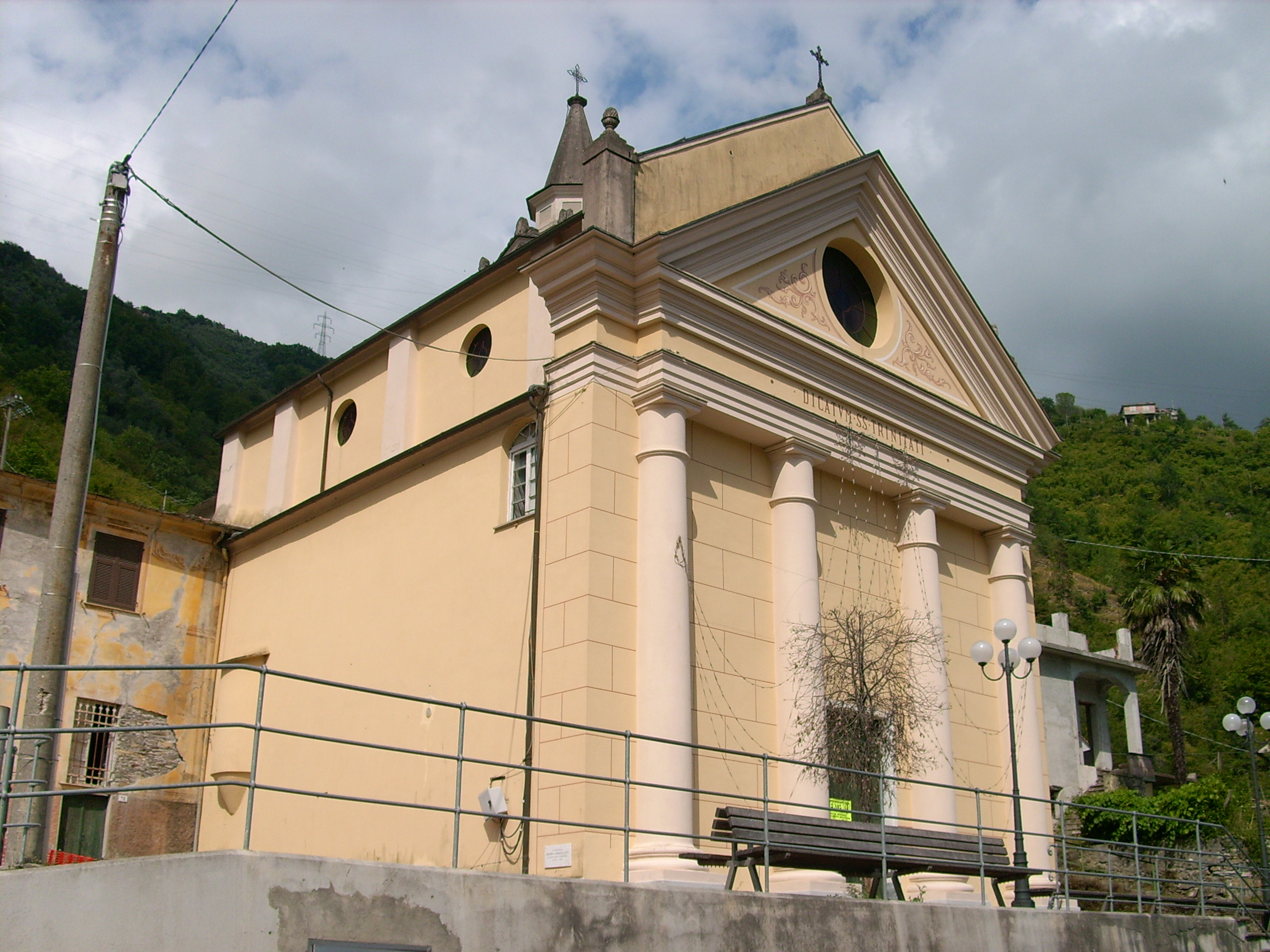 Chiesa di Santa Maria Assunta presso San Colombano Certenoli, Liguria, Italia